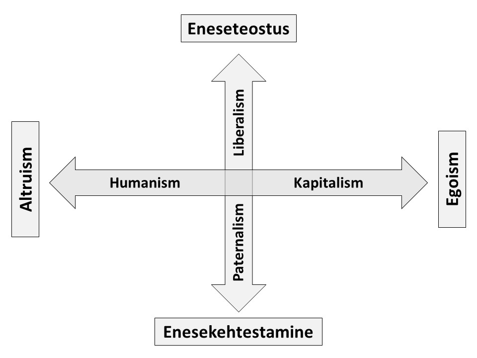 Neli põhiideoloogiat